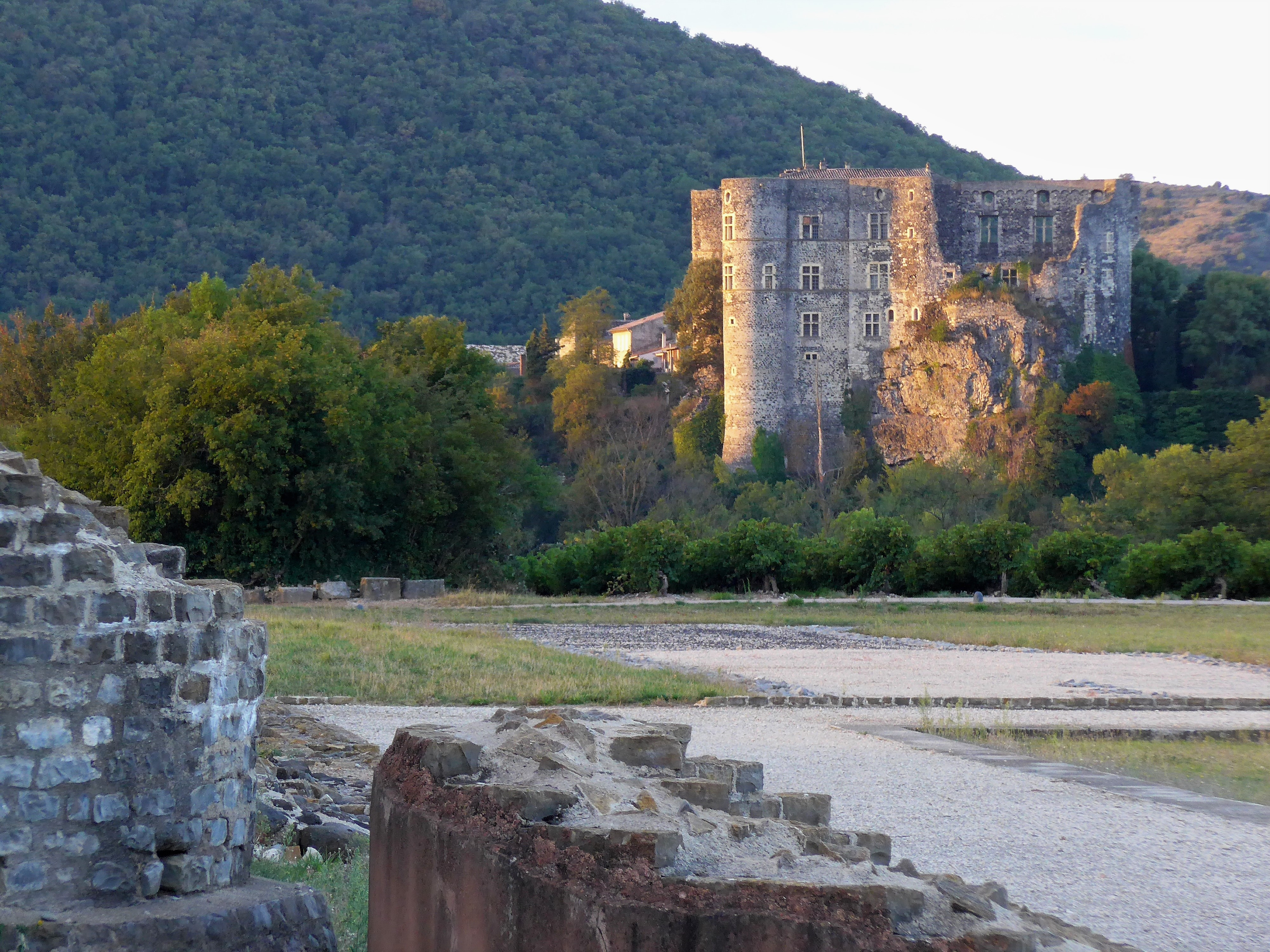 Photo prise depuis les ruines de la citée romaine d'Alba Helvorium